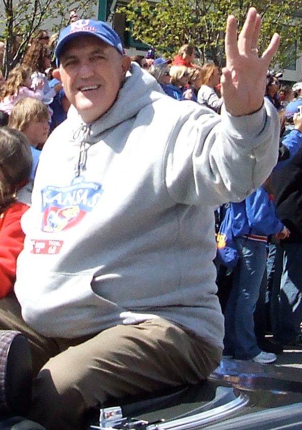 Lew Perkins